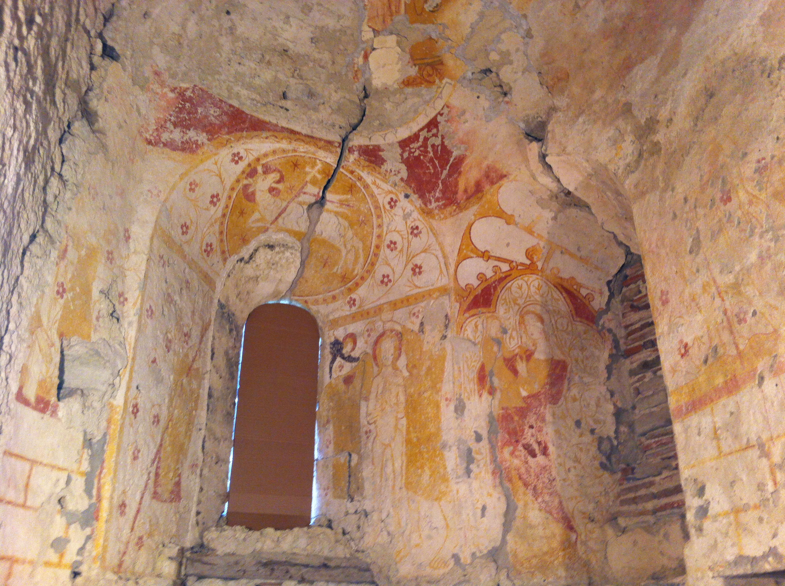 peinture du chœur de l'église Saint-André de Taxat